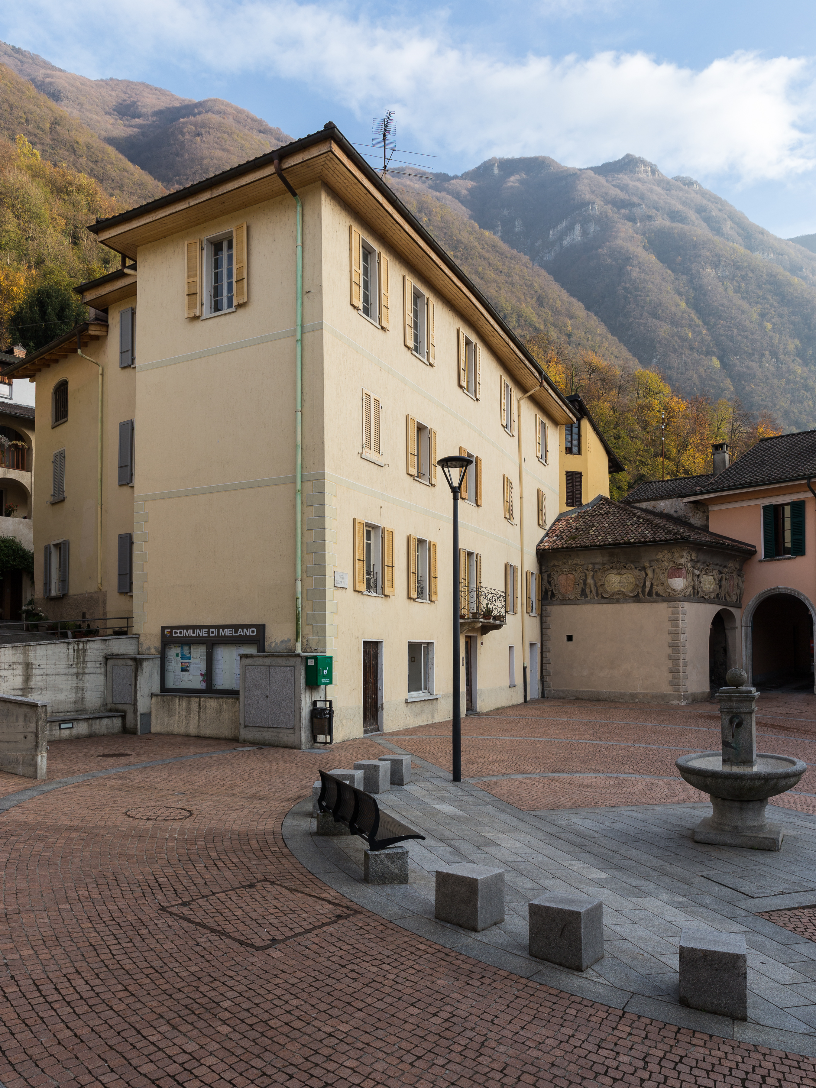 Piazza Giuseppe Motta in Melano, Tessin